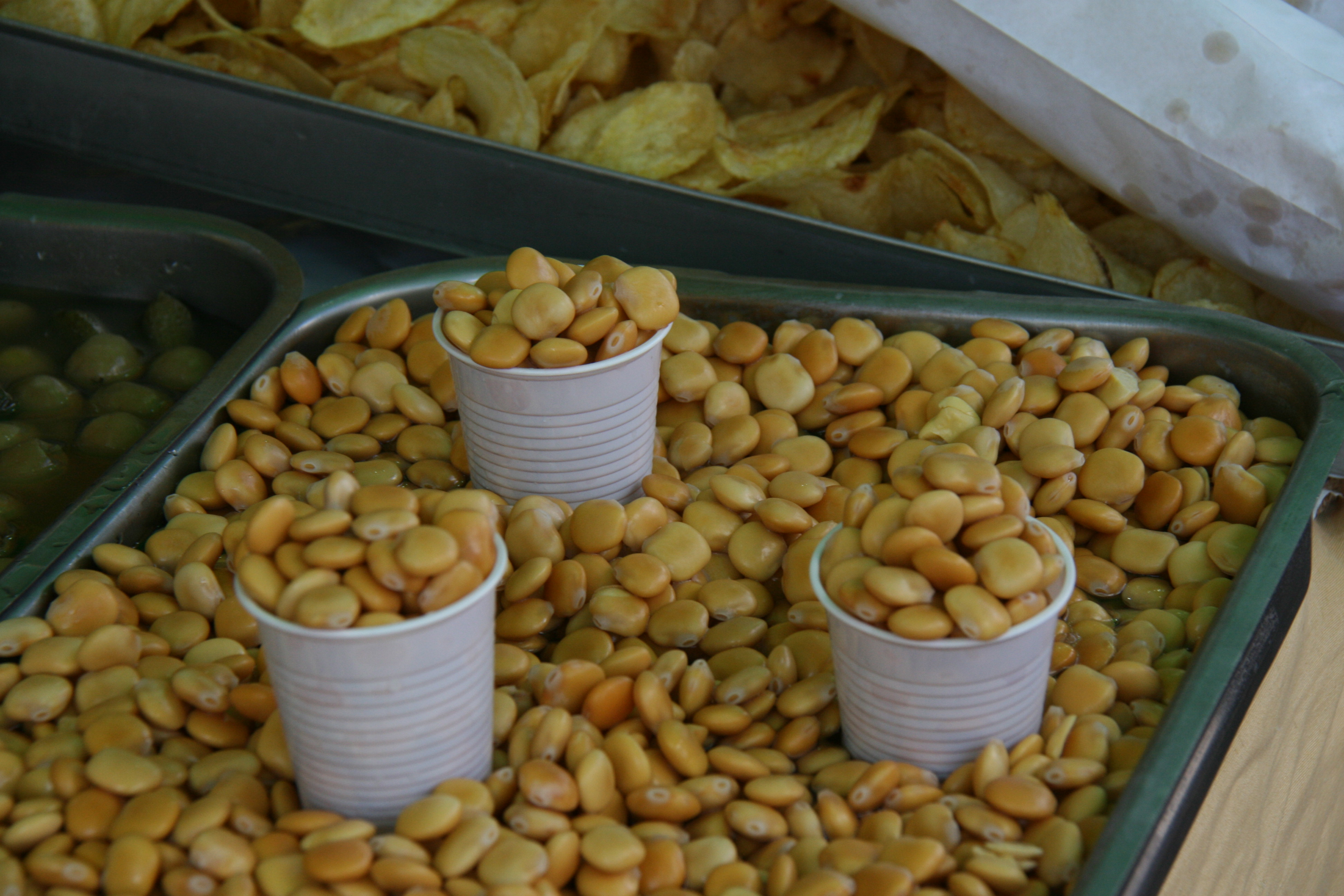 Altramuces en un mercado